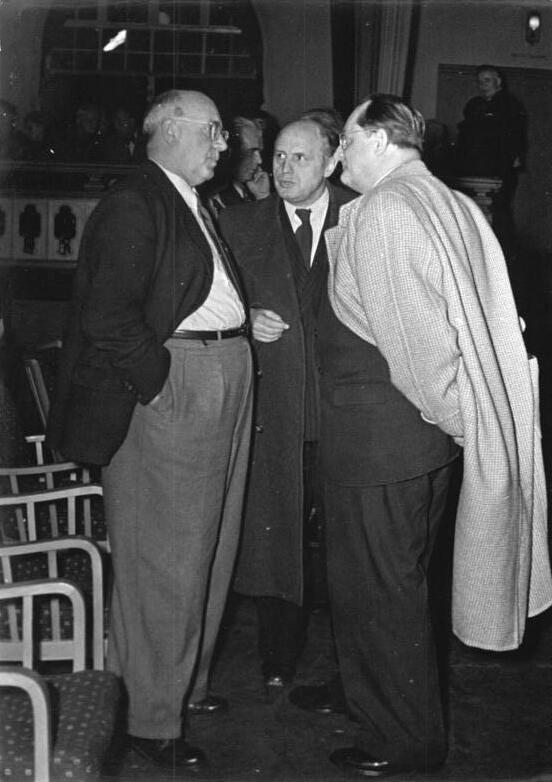 Zentralbild-Illner 23.11.1953 Festliche Kundgebung am Vorabend der Verlegerkonferenz. Am Vorabend der Verlegerkonferenz 1953, die vom Amt für Literatur- und Verlagswesen der Deutschen Demokratischen Republik einberufen worden war, fand am 20.11.53 im Felsenkeller von Leipzig eine festliche Kundgebung statt. UBz: Stalinfriedesnpreisträger und nationalpreisträger Johannes R. Becher (links) im Gespräch mit dem Generalmusikintendanten Max Burghardt und dem Chefdramaturgen Ferd. May.